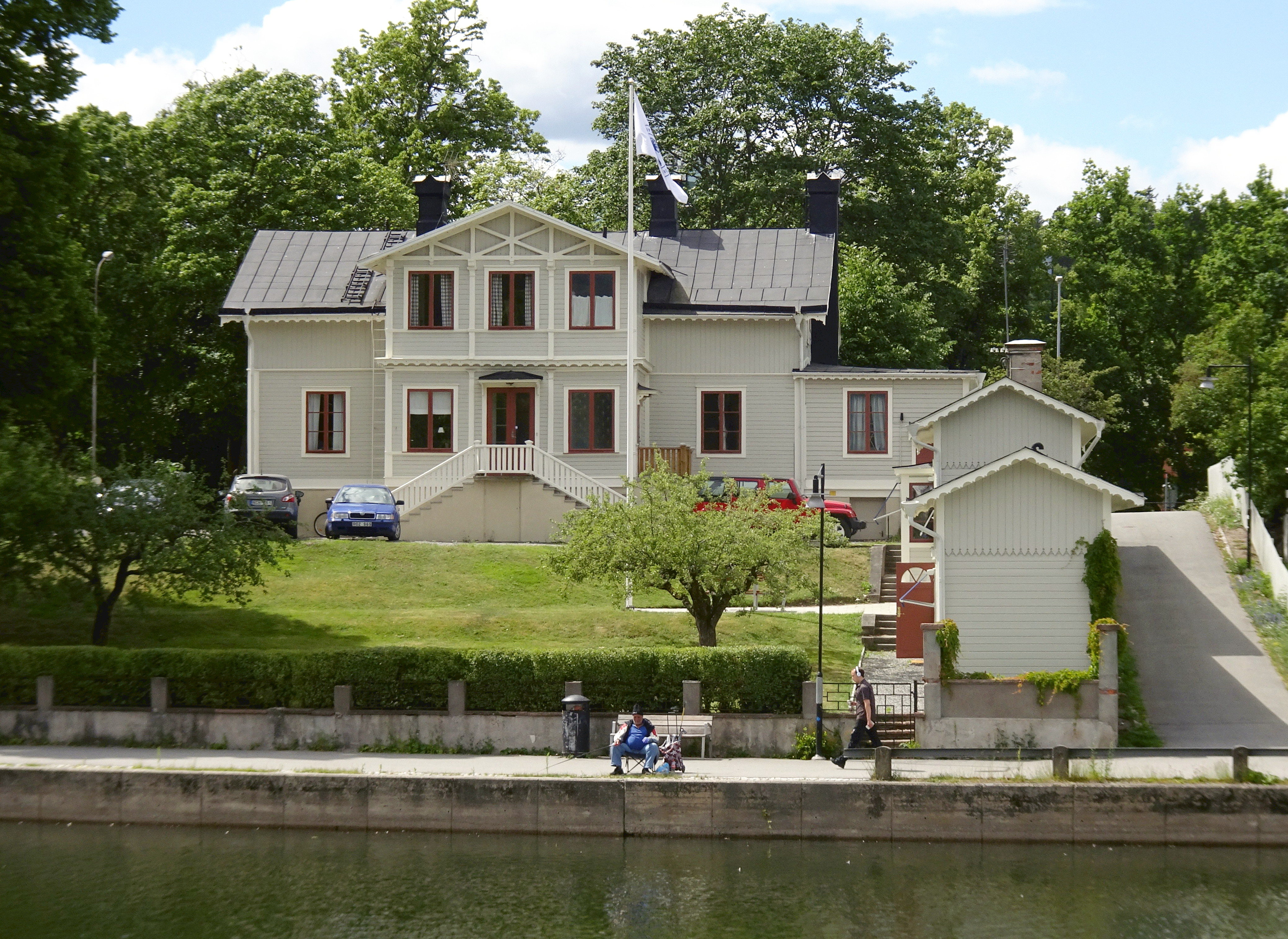 Kvarteret Vattumannen 1, Saltsjögatan 15, ombyggd 1901 av Hjalmar Cederström (fasad mot Strandgatan)